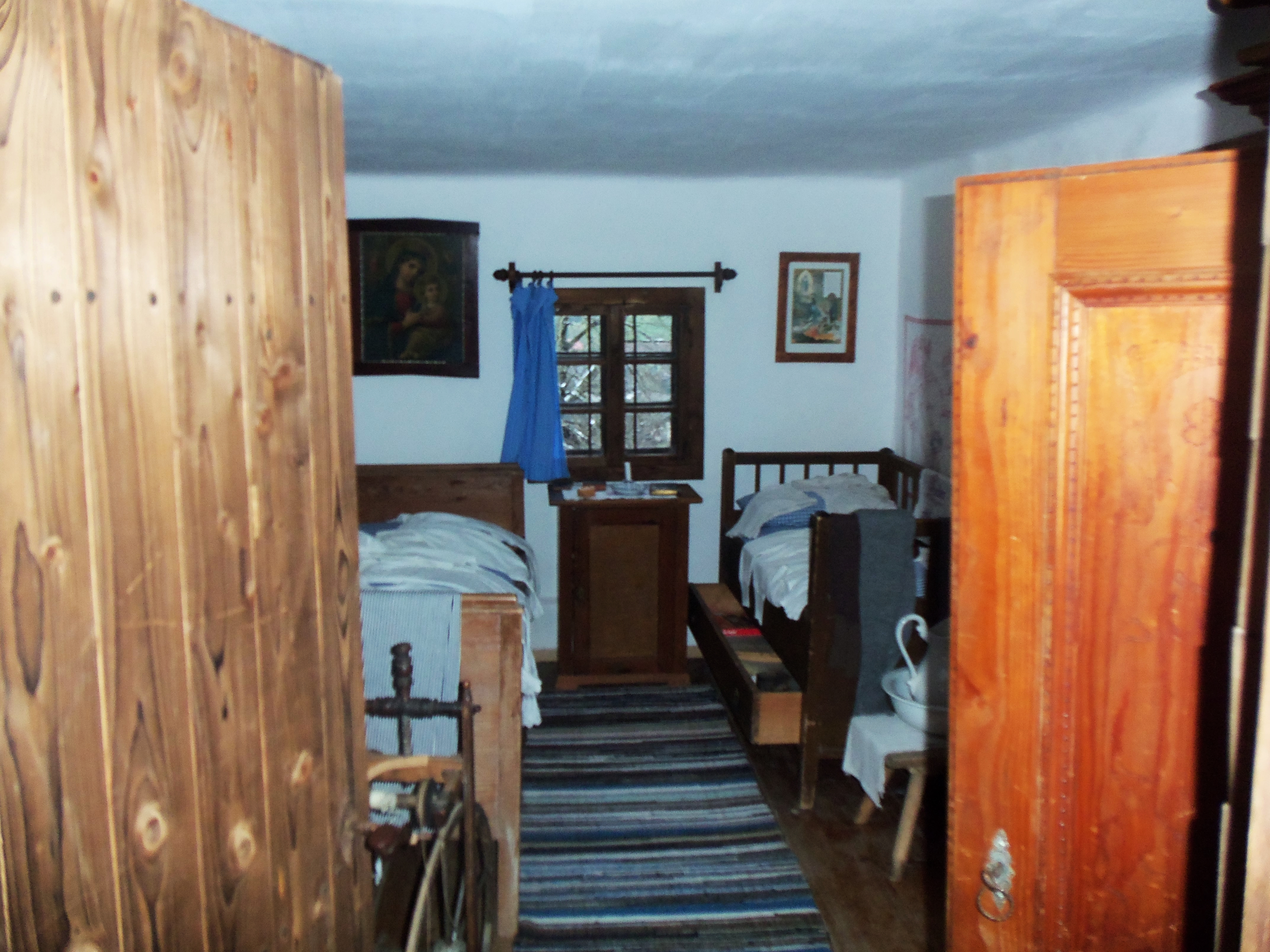 Kinderzimmer